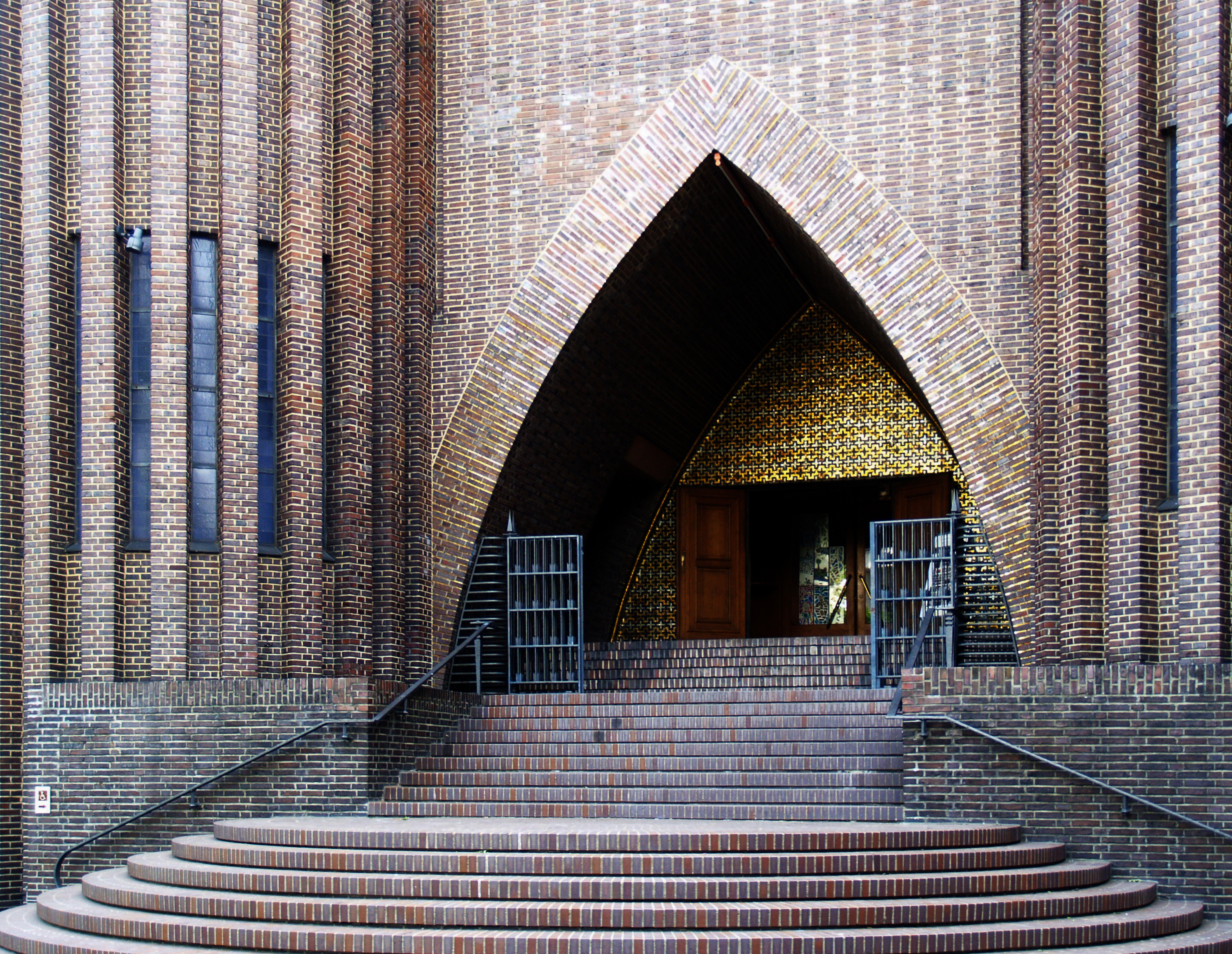 Kirche am Hohenzollernplatz, Berlin 1930-1933. Architect: Fritz Höger, 1877-1949.